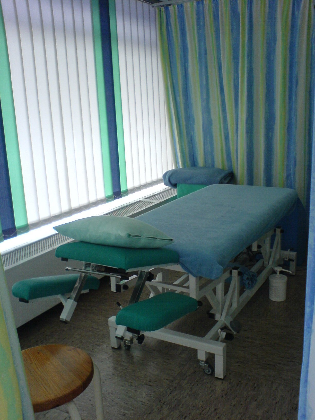 Massageliege